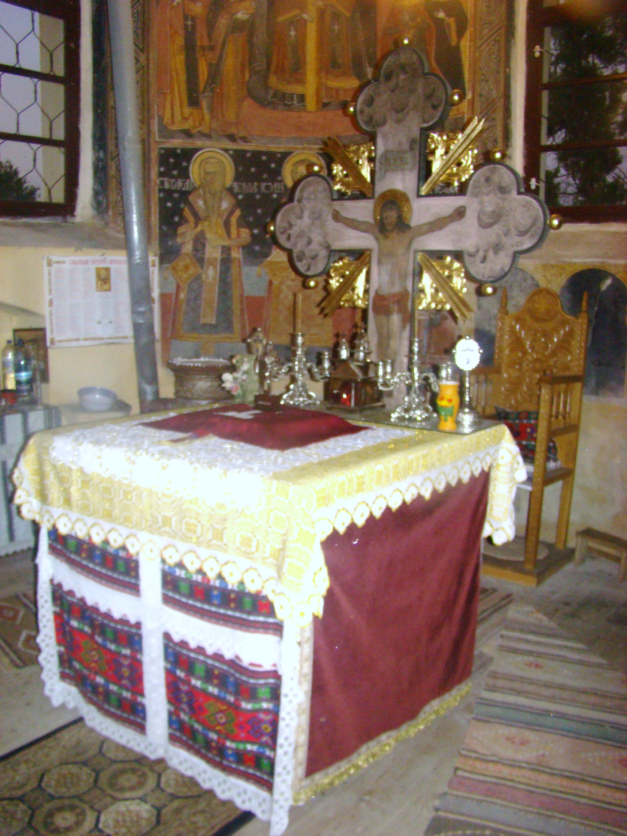 Biserica „Sfântul Vasile cel Mare” din Fofeldea, județul Sibiu